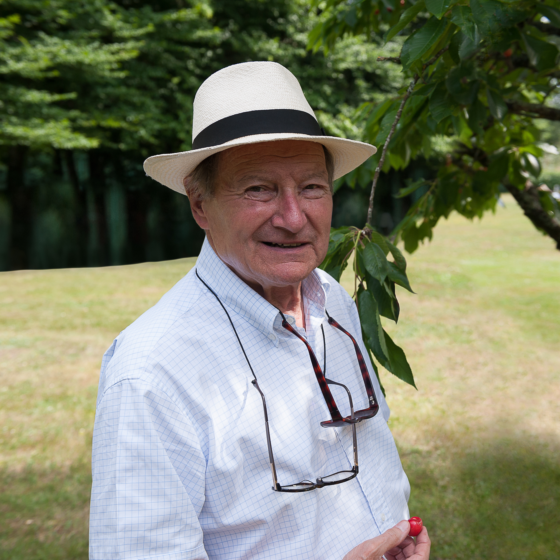 Photographie d'André Lurton prise en 2011 lors de l'anniversaire de l'un de ses amis au Château Bonnet.